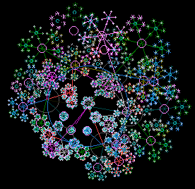 Fraktala blommor, skapade med ett Lindenmayer system. Kategori:Bilder av fraktaler